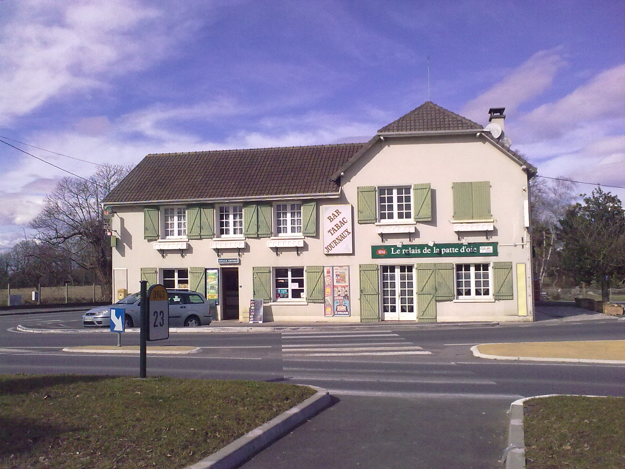 Le bar-tabac de Saint-Jammes. C'est le seul et il ce situe à 150 mètres de la mairie.